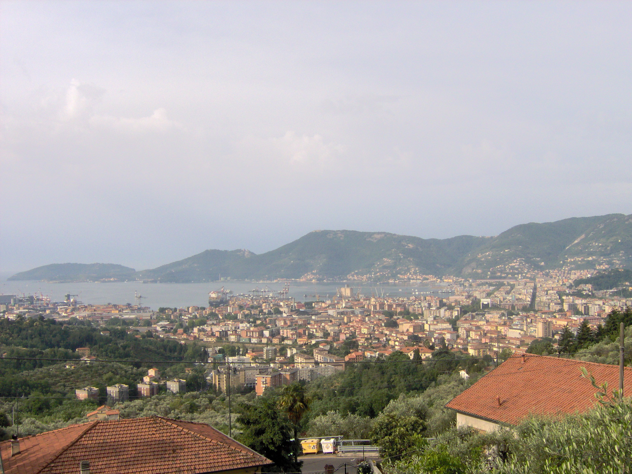 La Spezia vista dalla frazione di Carozzo